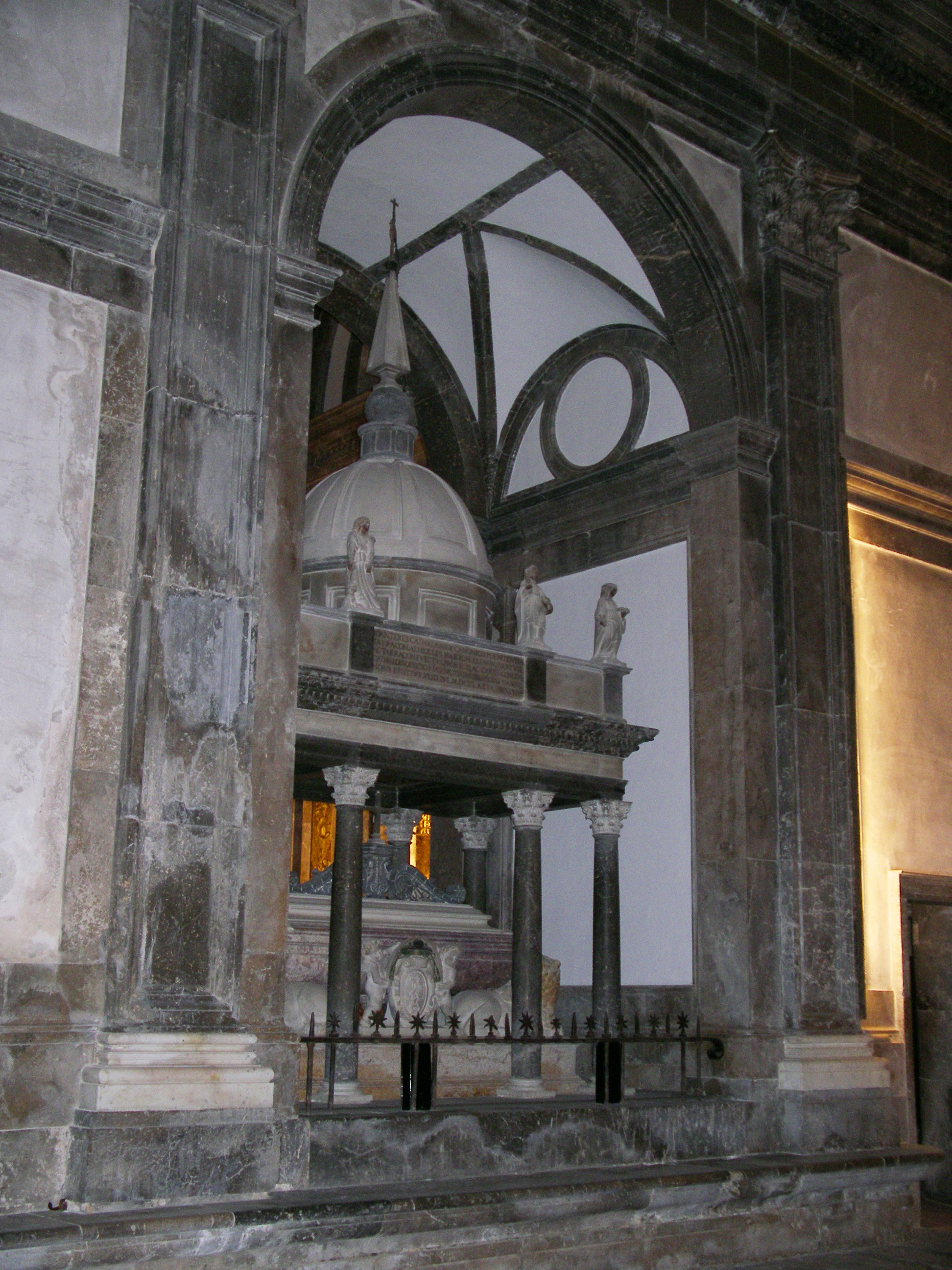 Catedral de Tarragona: capelles de Sant Fructuós i Sant Joan Realitzades per l'arquitecte Pere Blai d'estil renaixentista van ser encarregades per la seva sepultura pel bisbe Joan Terès i Borrull, es va començar a construir l'any 1592. Mort el bisbe, Blai va dissenyar el sepulcre, obrint el mur divisori de les dues capelles per allotjar-ho sota l'arc de comunicació, el sarcòfag es tracta d'una urna quadrada que fa de base a un templet sostingut per columnes corínties en marbre i jaspi, aquest templet té una cúpula semiesfèrica.